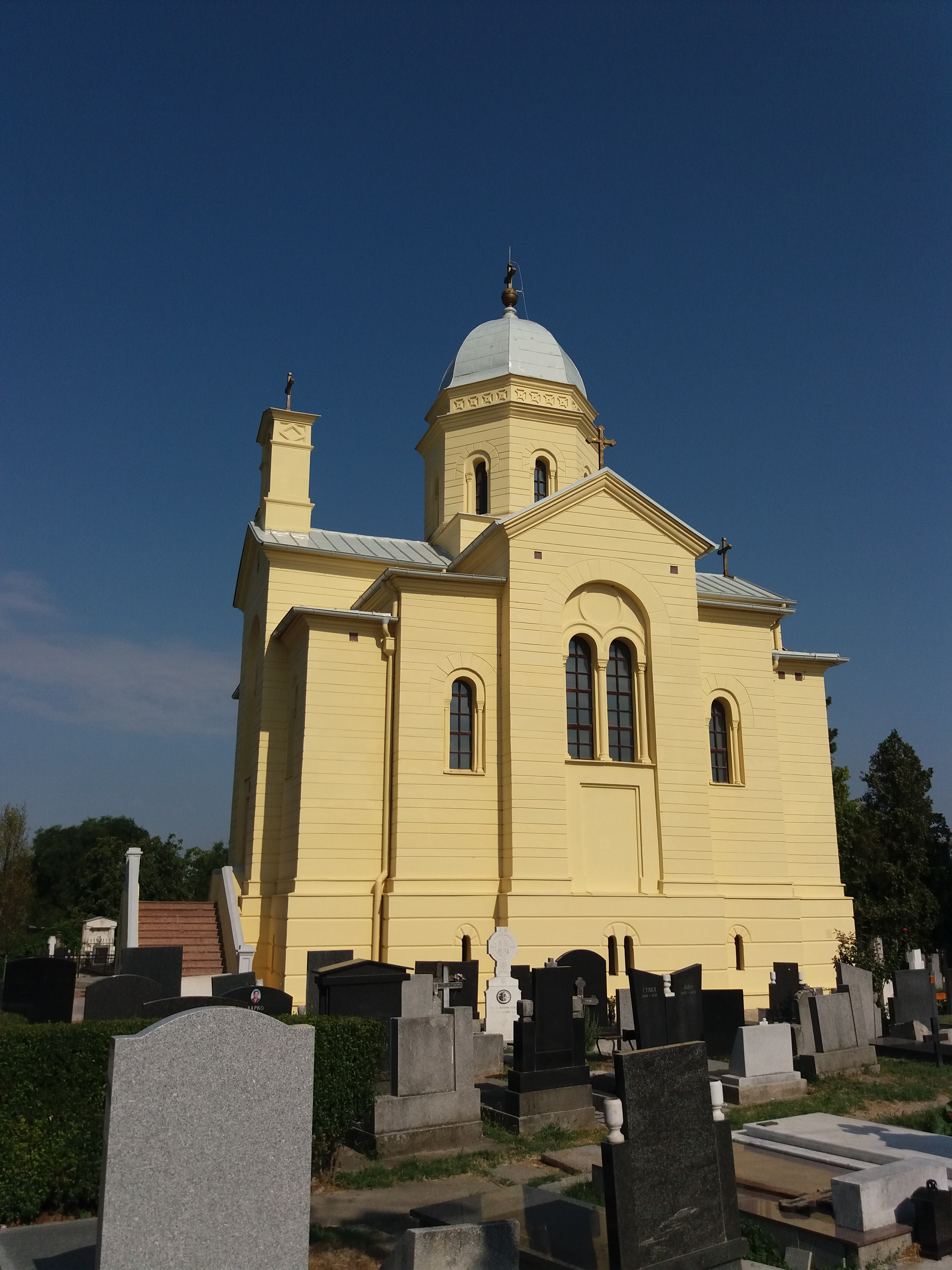 Srpski (latinica): Crkva Svetog Dimitrija, Zemun